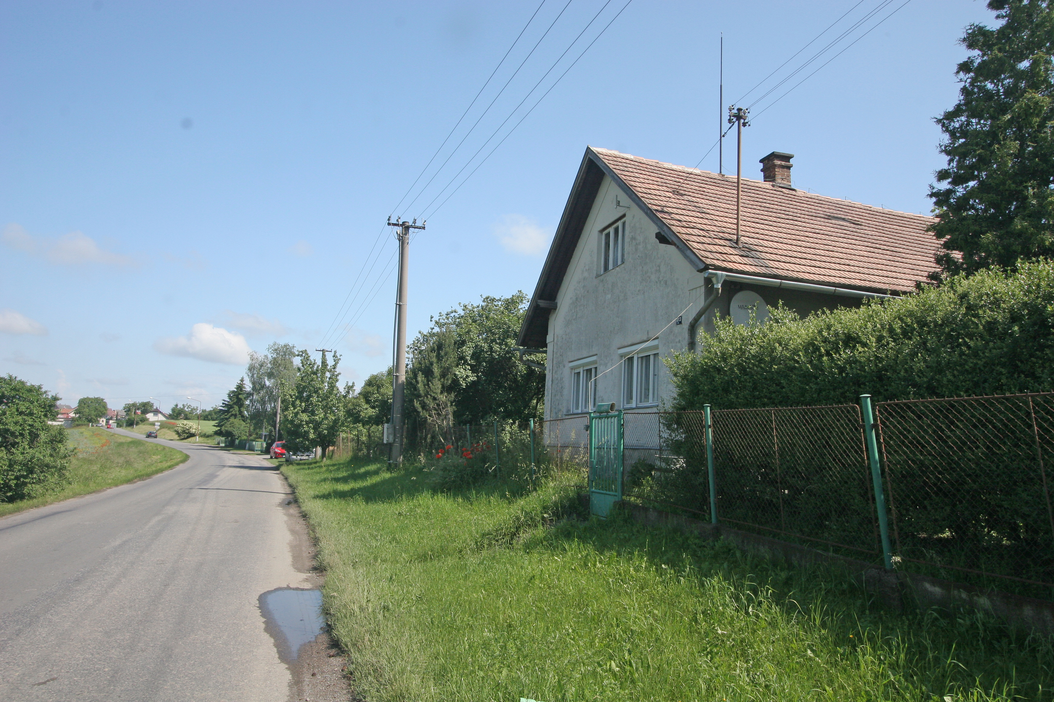 Vrcha čp. 1013